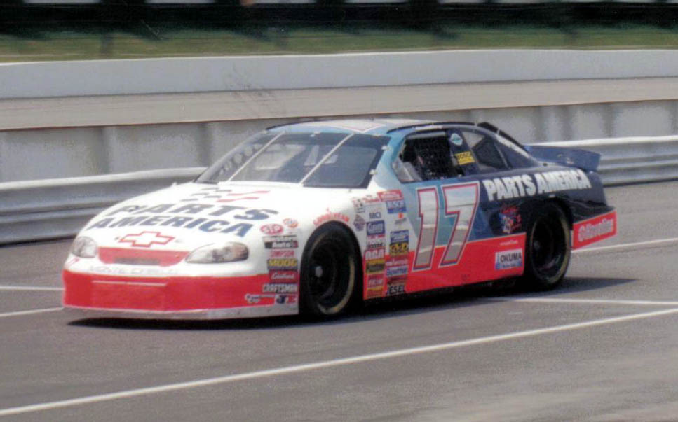 NASCAR driver Darrell Waltrip at Pocono in 1997.